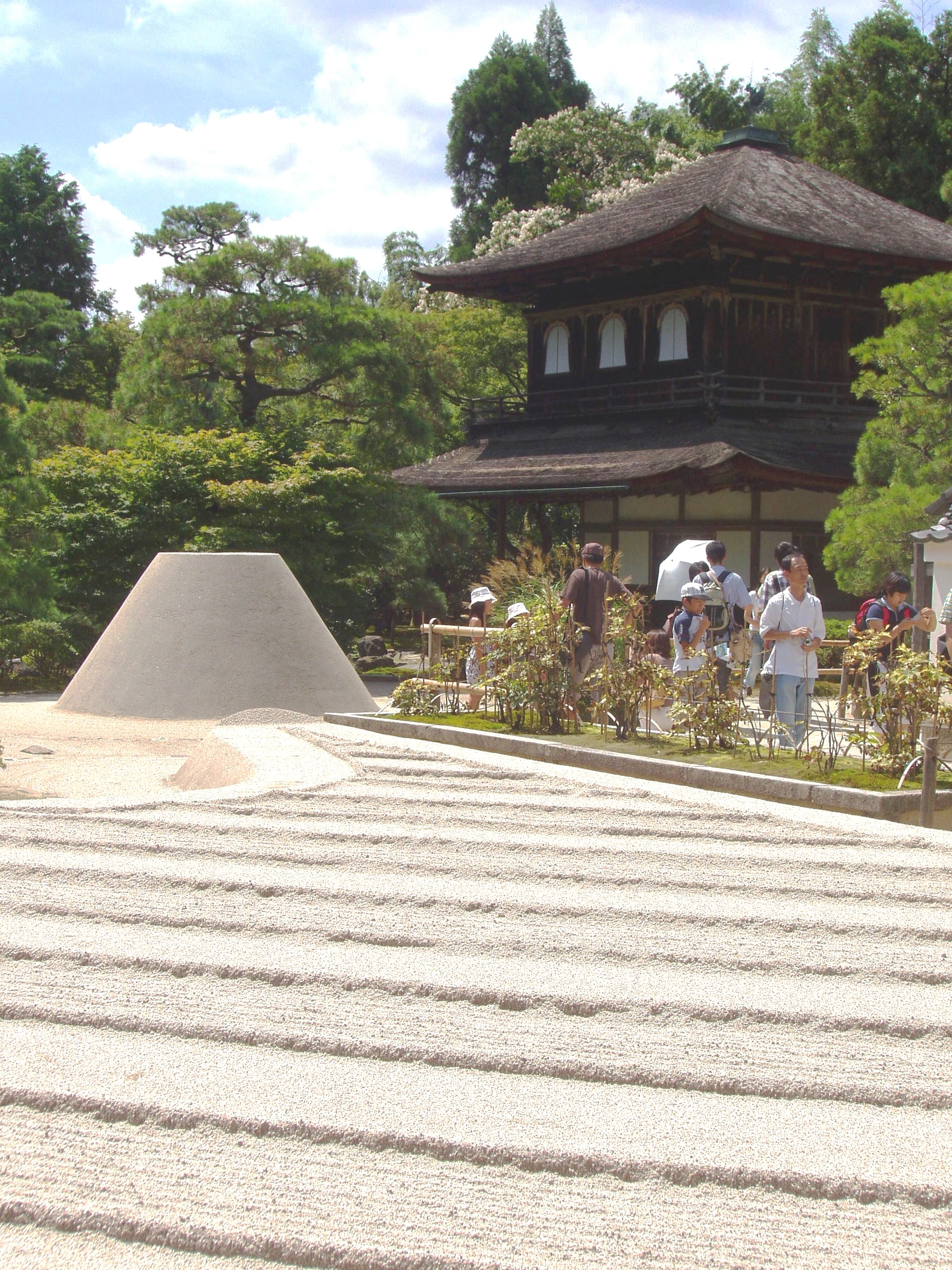 Ginkaku-ji temple, Kyoto, Japan - Ginkaku-ji with sand garden.